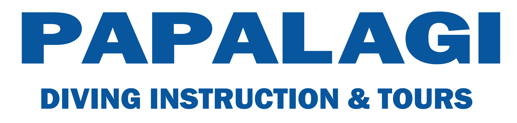 ロゴマーク